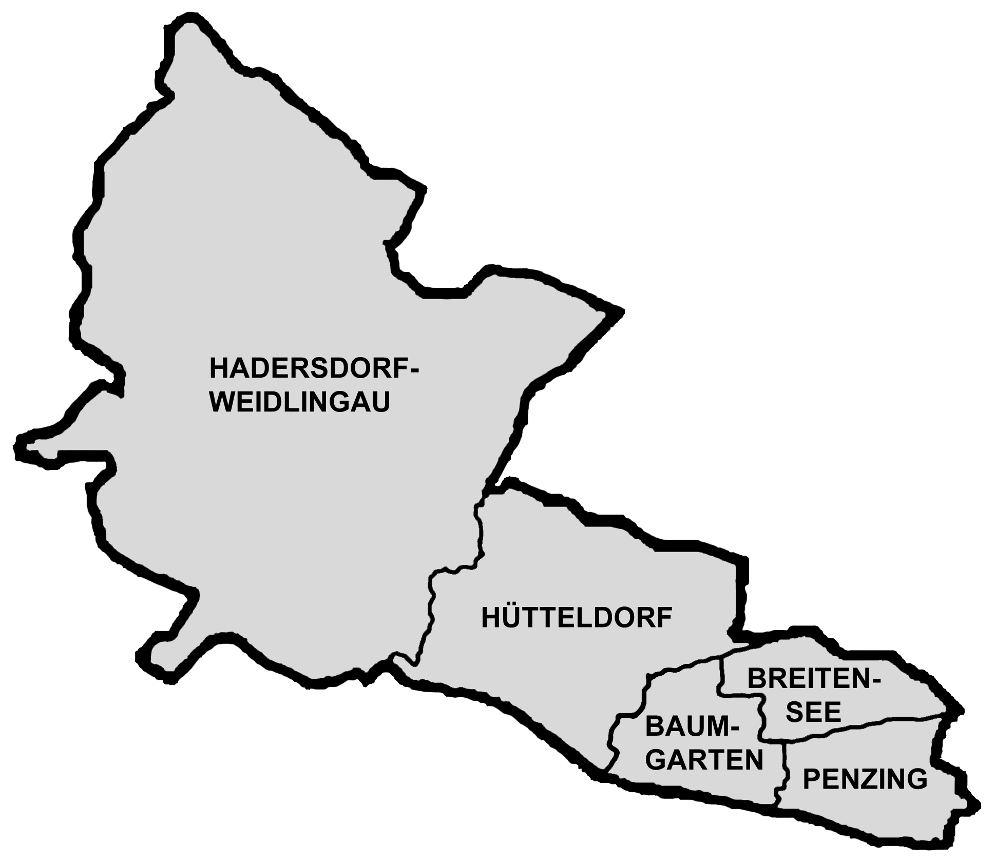 Karte der Bezirksteile von Penzing in Wien